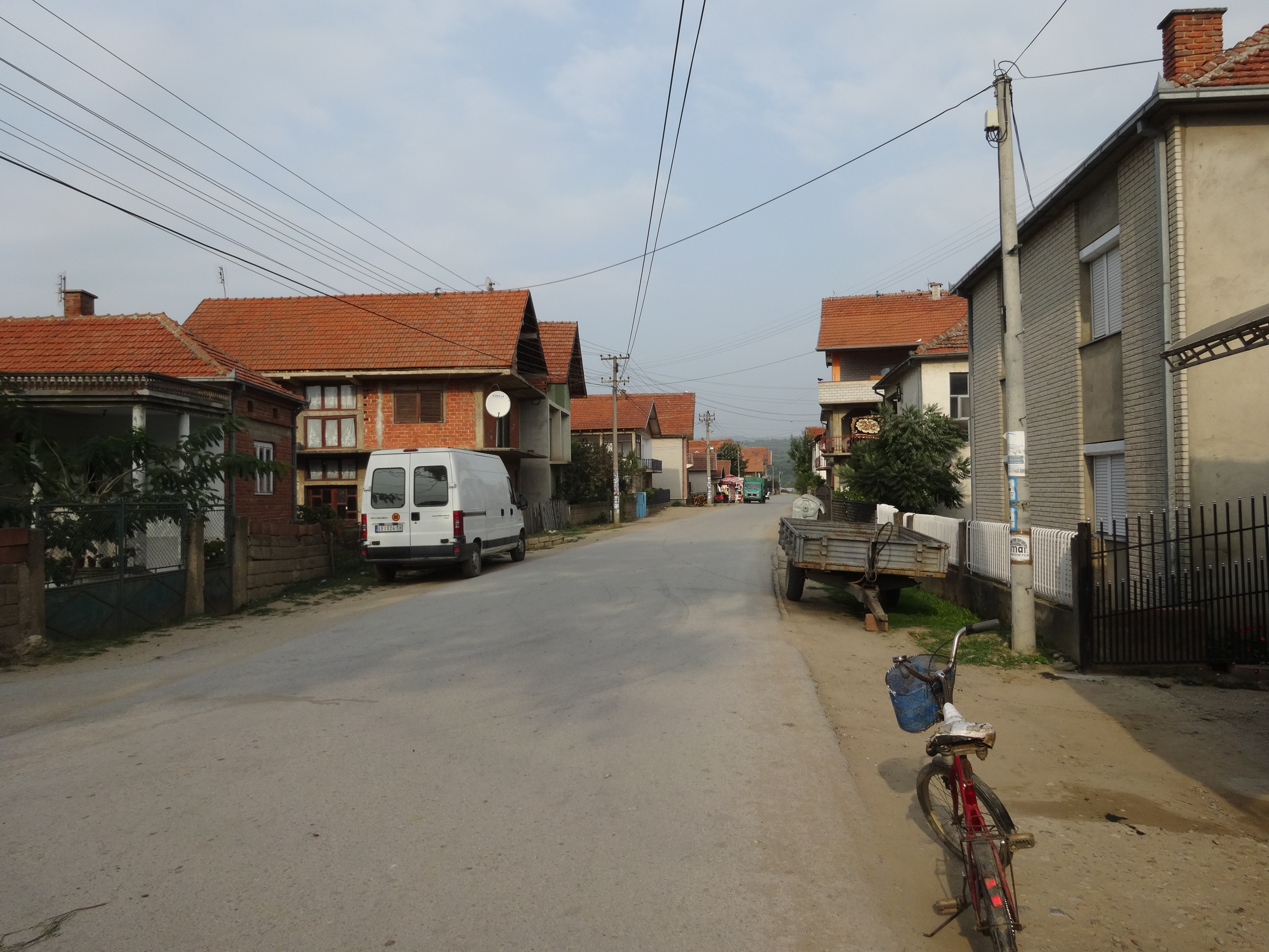 Donje Krajince, Leskovac